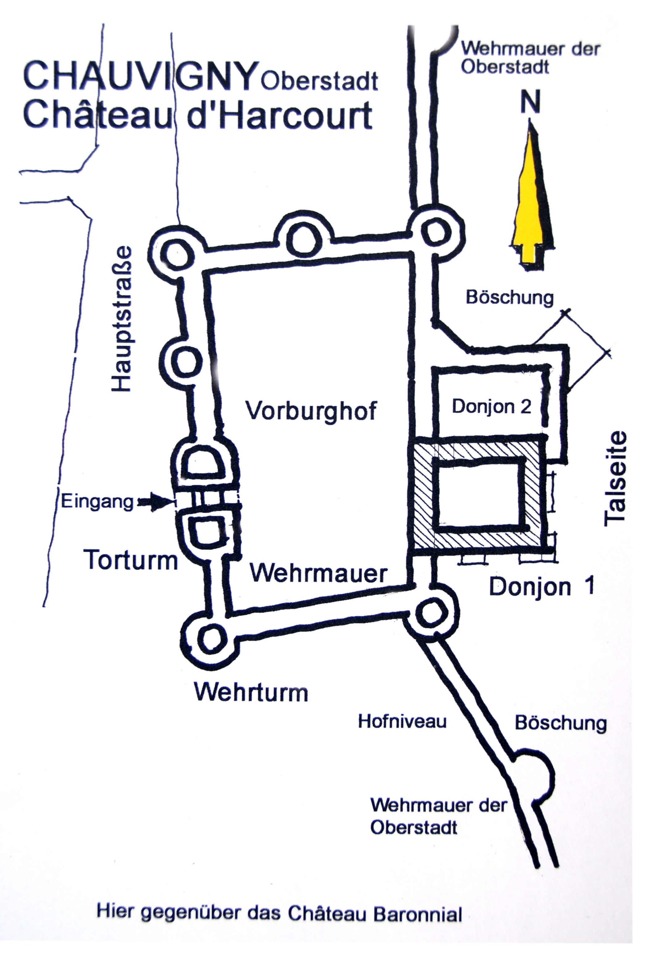 Chât.d'Harcourt, Grundriss